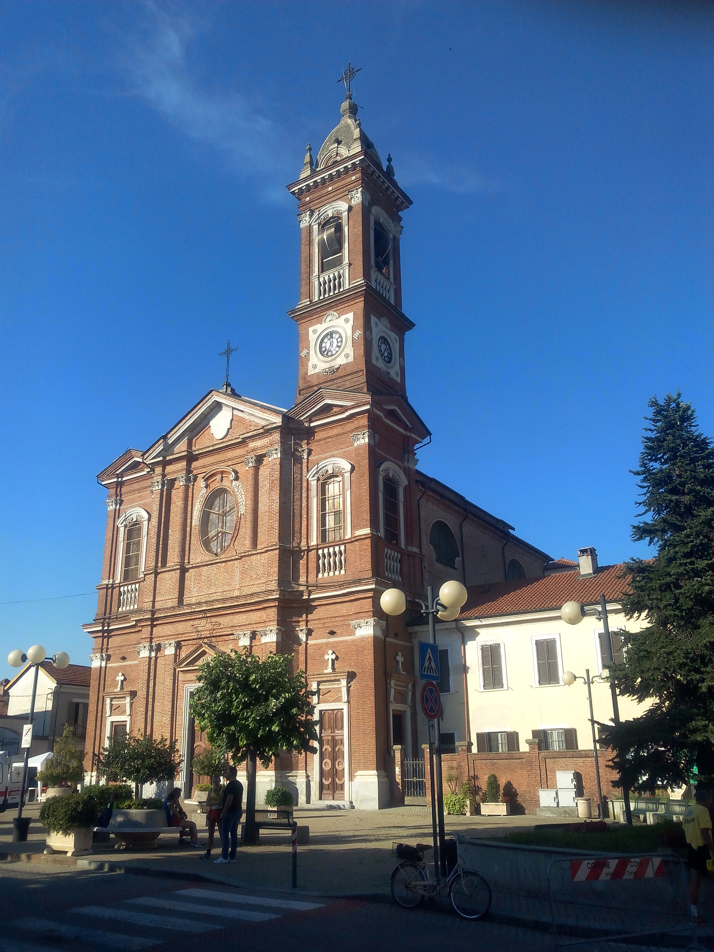 Bosconero (TO): la chiesa parrocchiale